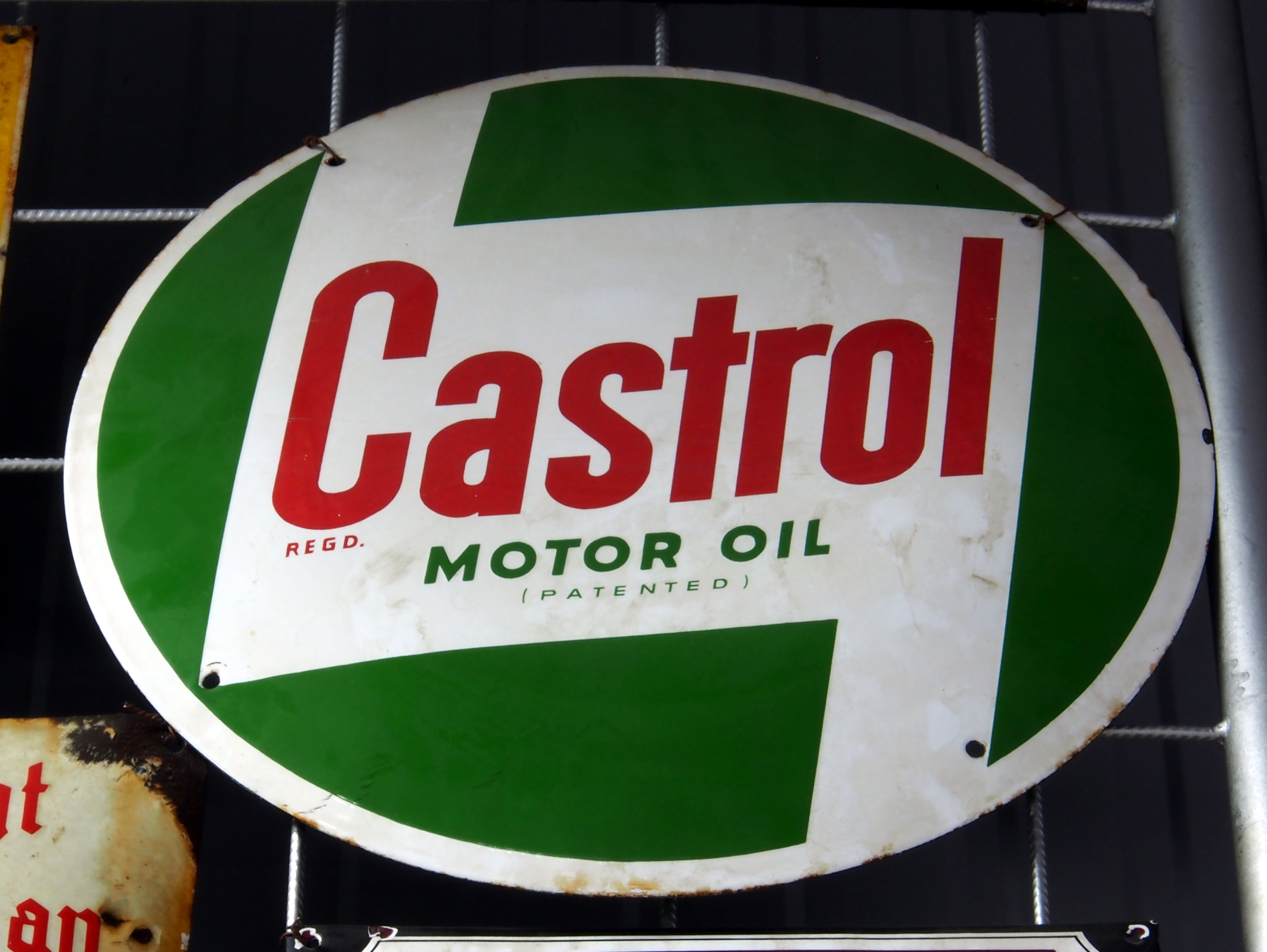 Castrol motor oil, enamel advertising sign.